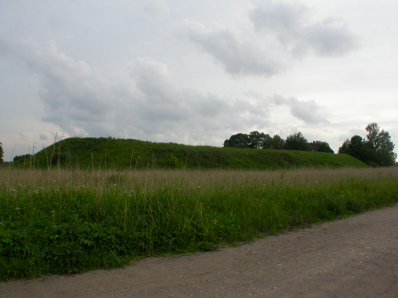 Zviedru skansts (Vecdaugavā).